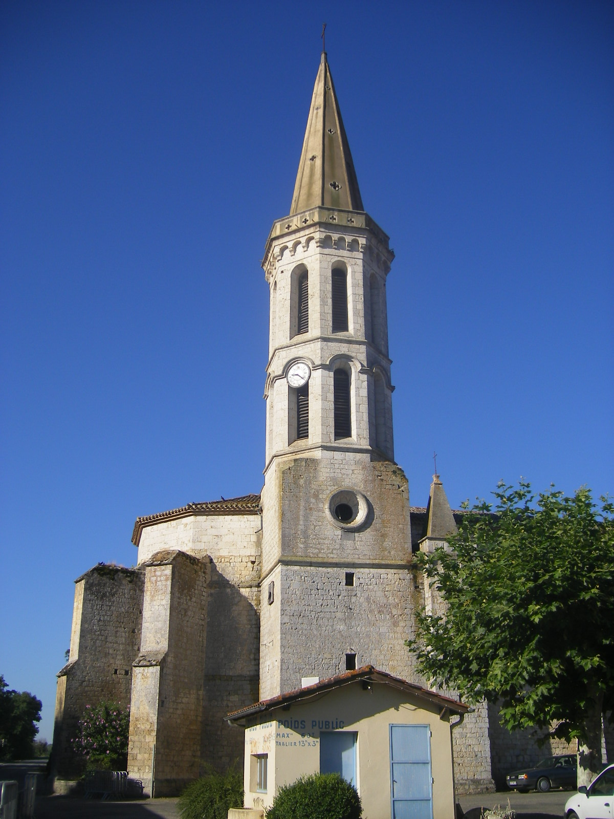 Solomiac